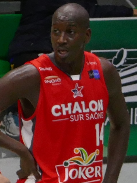 Ousmane Camara basket-ball